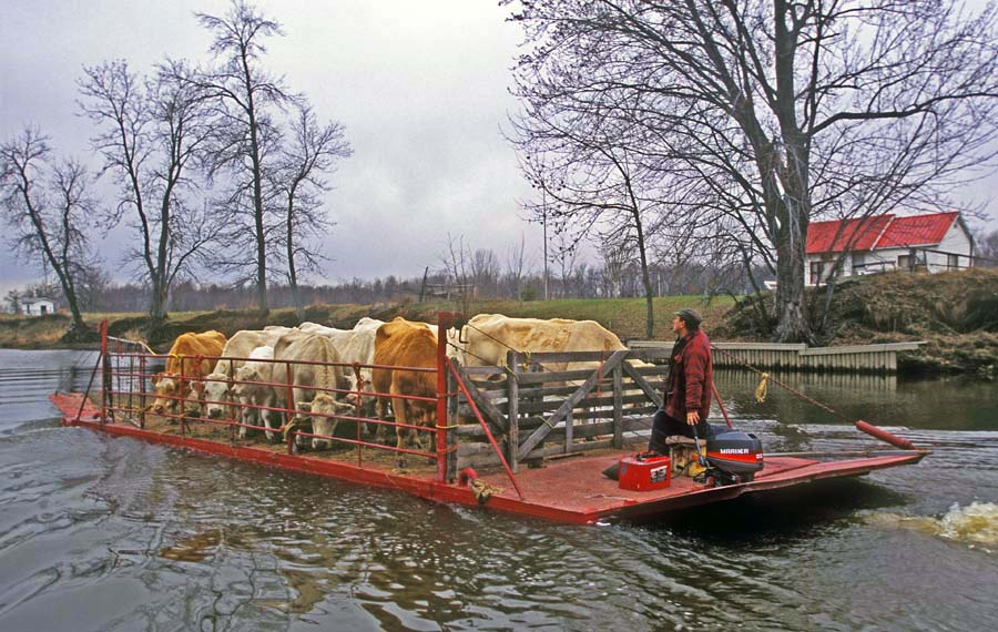 En été, les îles sont des pâturages à ciel ouvert, sans clôtures.